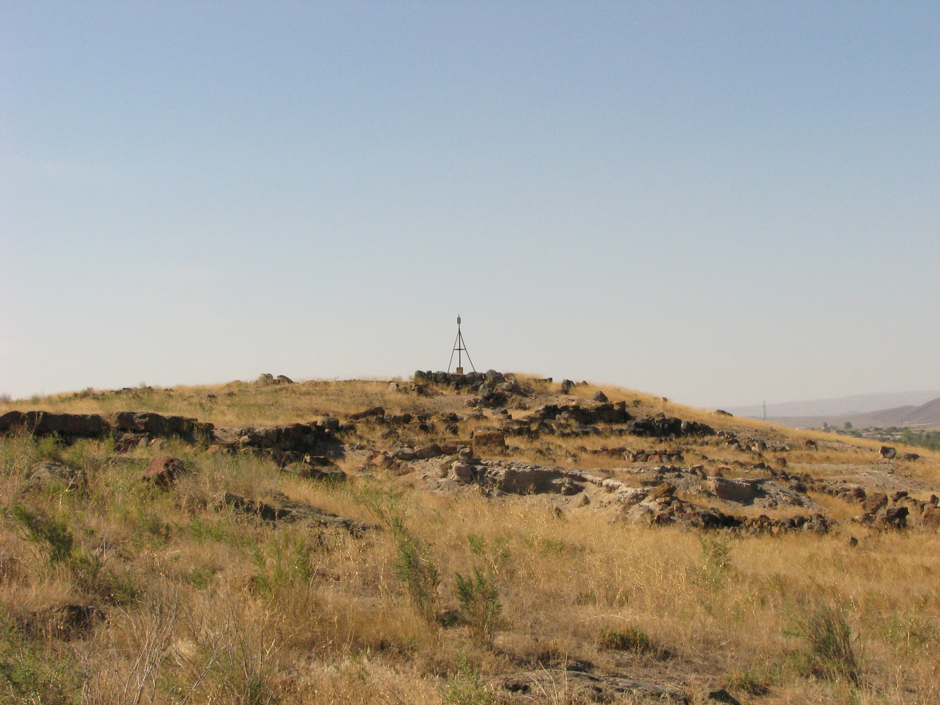 Քաղաքատեղի Մեծամոր 93/3